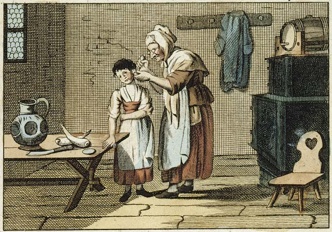 Ein eitles Mädchen läßt sich Ohrenlöchelchen stechen; Lusemihl (graveur); Lusemihl (drawing) Copperplate engraving, colorized, 75 x 92 mm